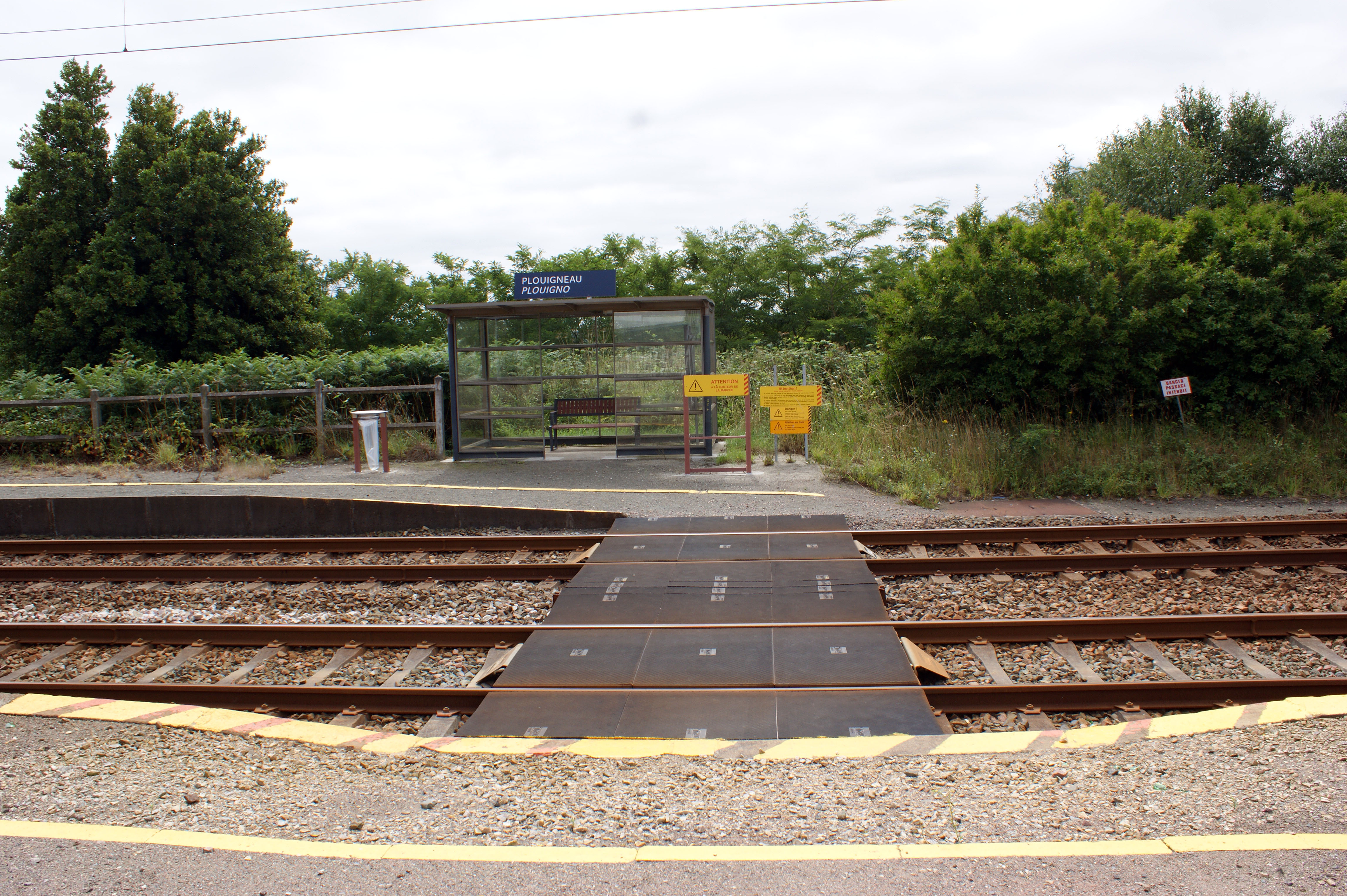 Gare de Plouigneau, le passage d'un quai à l'autre et l'abri du quai en direction de Morlaix.